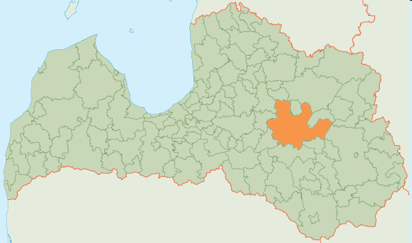 Karte von Madona